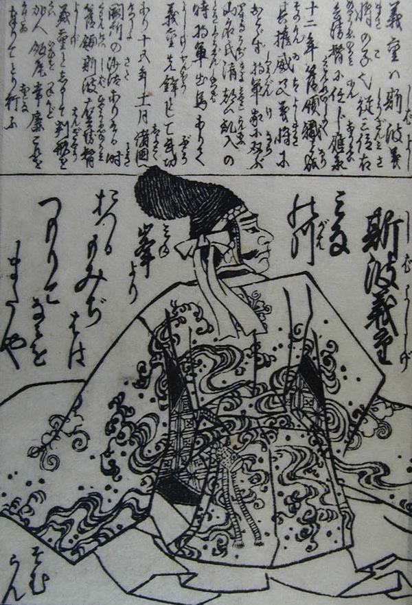 shibayoshishige